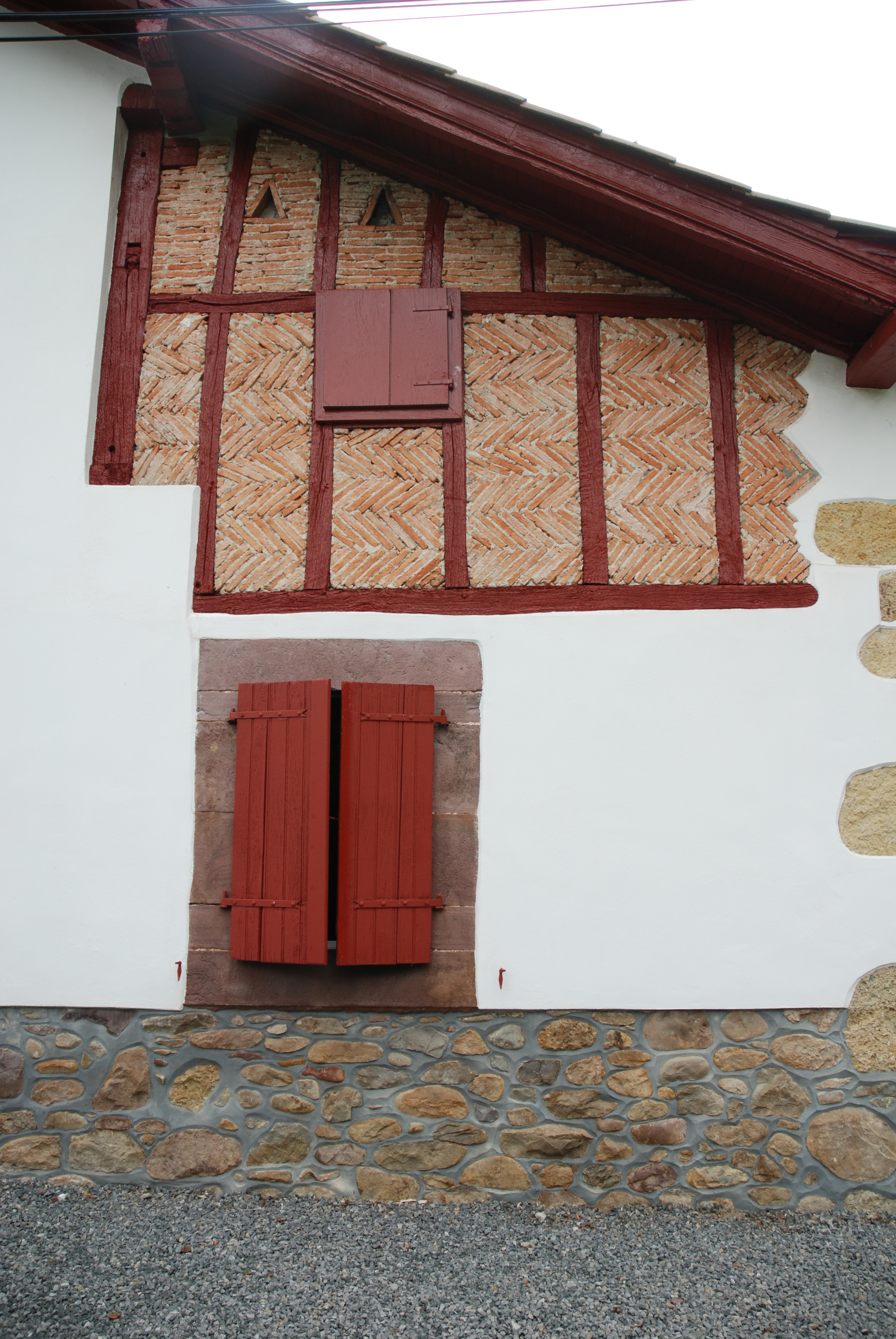 Lecumberry, pan de briques sur une maison de Basse-Navarre